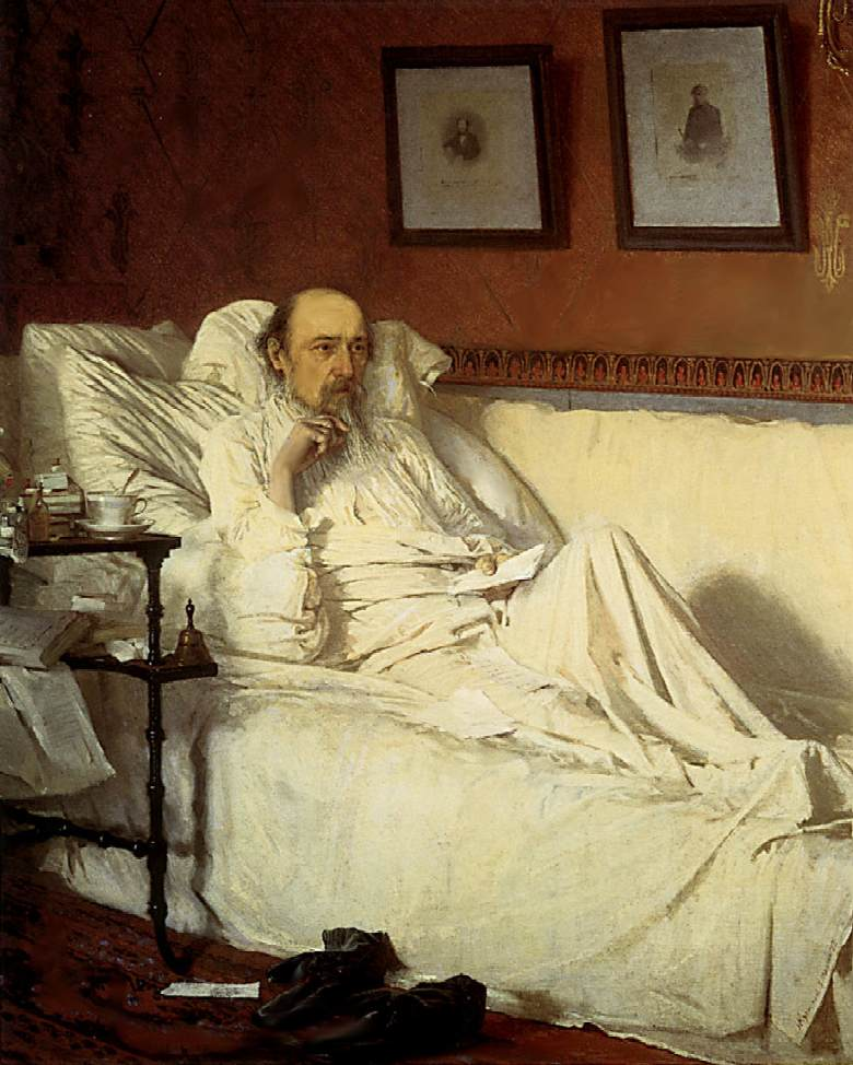 Il poeta Nikolaj Nekrasov compone gli "Ultimi canti", olio su tela, Museo Tretiakov, Mosca